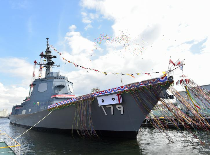 護衛艦まや, 海上自衛隊